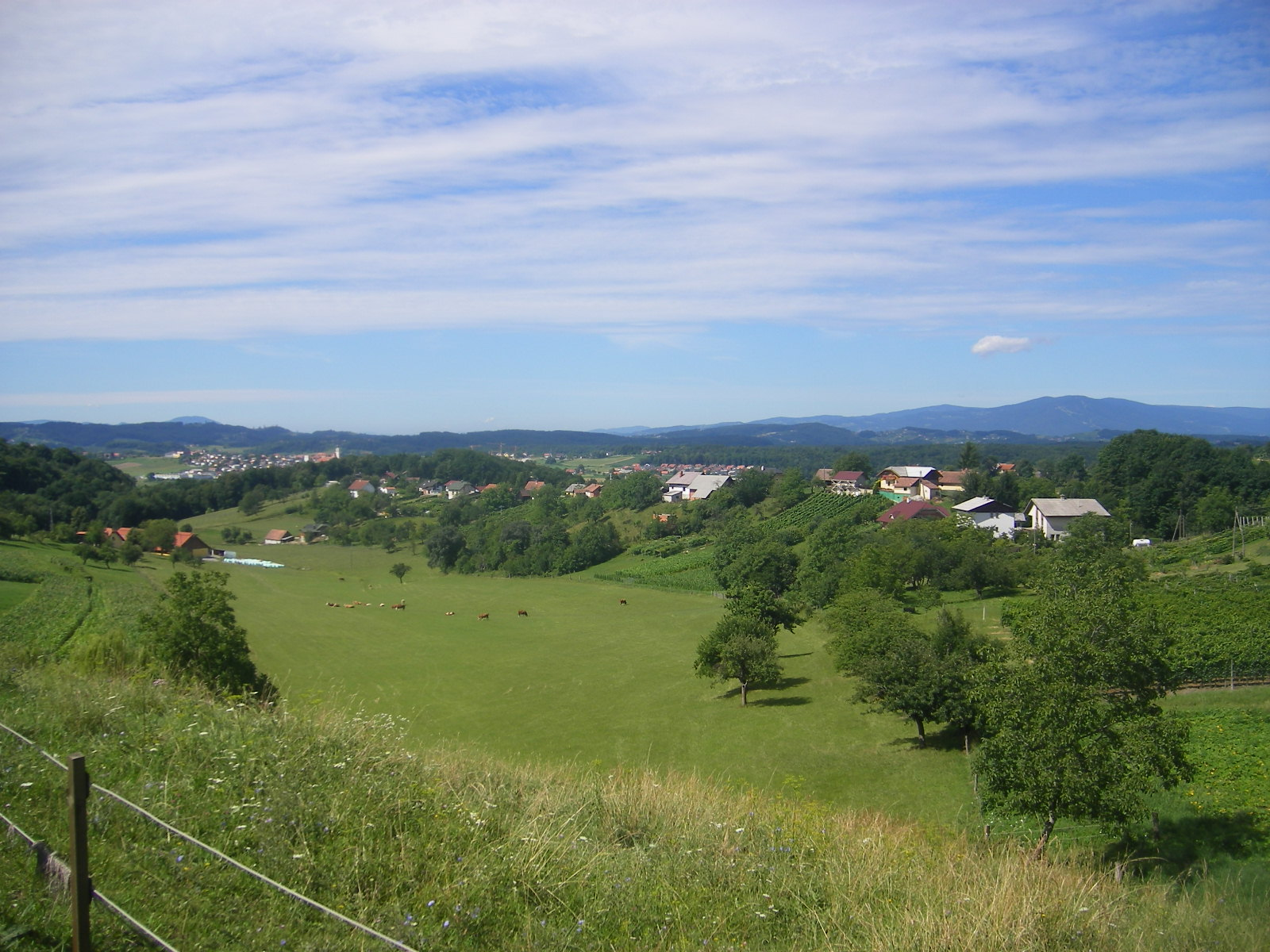 Landscape between Benedikt and Lenart